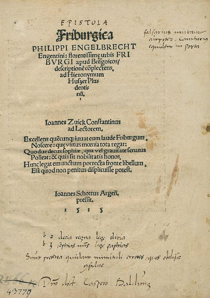 Druck "Friburgica" des Philipp Engelbrecht mit handschriftlichen (eigenhändigen?) Korrekturen und Widmung an Kaspar Baldung